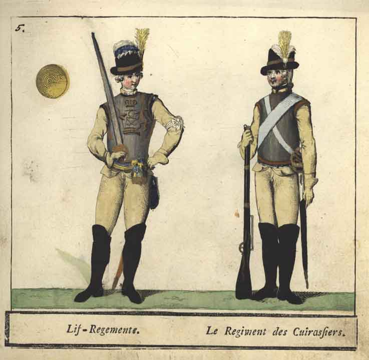 Livregementets uniform m/1779, ur C. G. Roos samling.